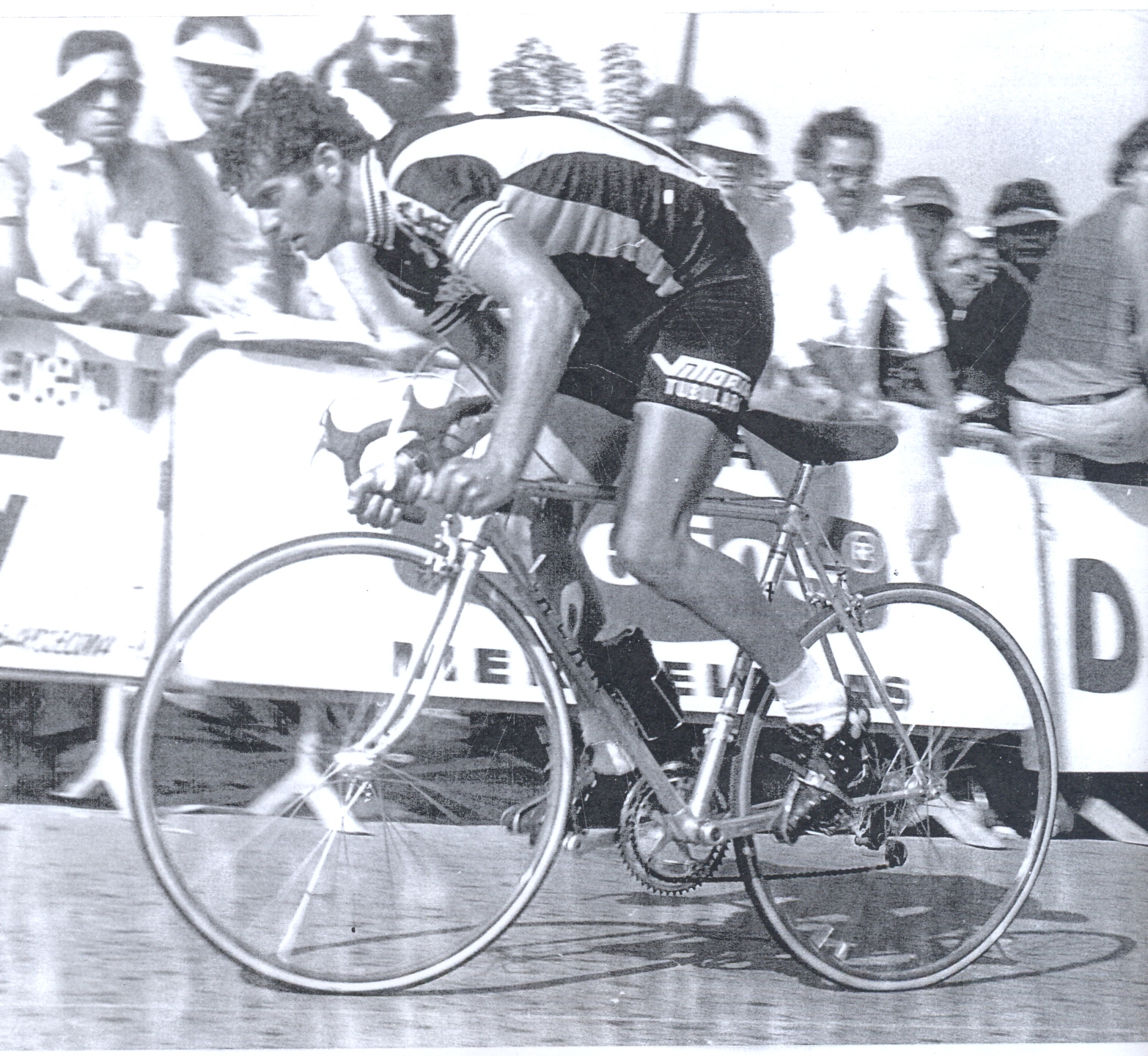 Ciclista Cántabro